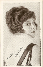 Barbara Castleton